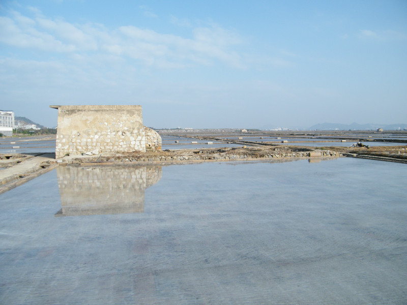 下尾拍的青洲盐场的盐埕 2011.2.7